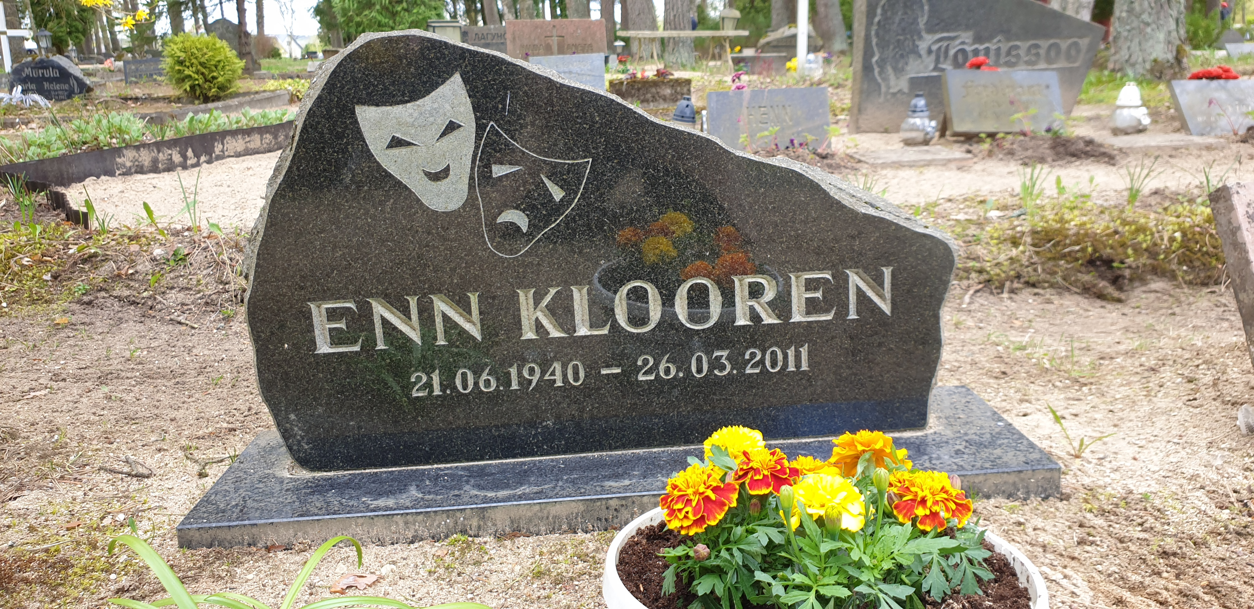 Enn Klooreni kalm